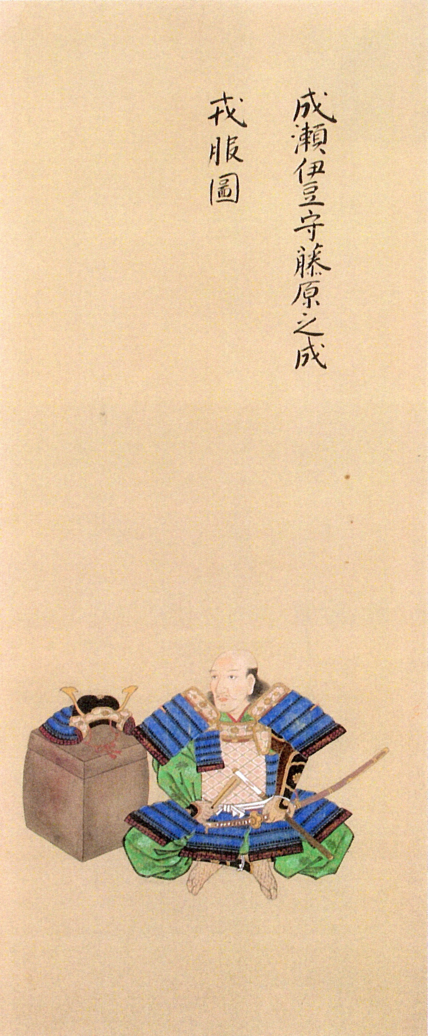 成瀬之成の肖像。